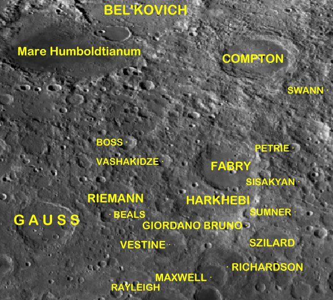 Cráter lunar Fabry. Localización. (Imagen LROC)